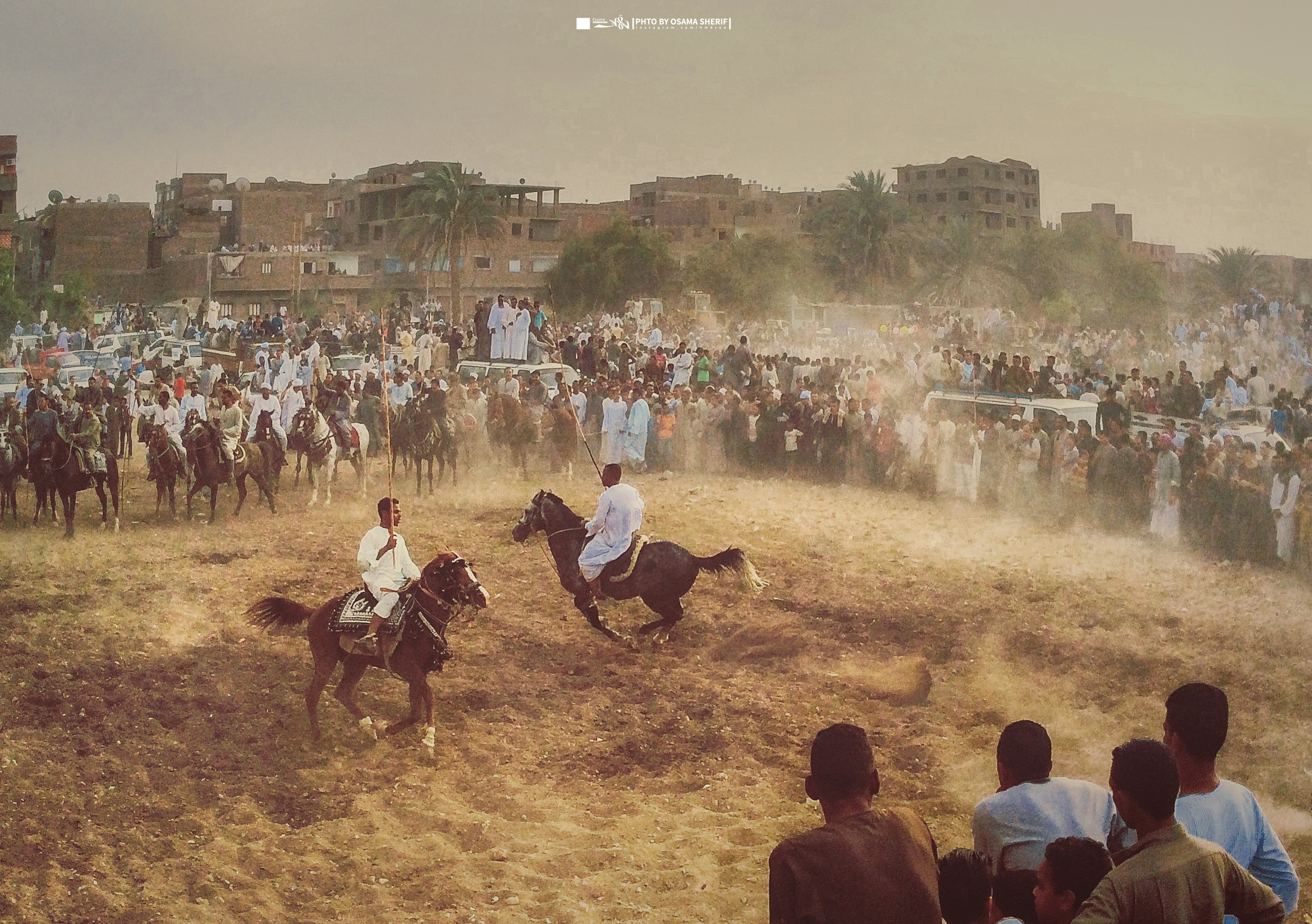 رغم حرص أهل الصعيد على تربية الخيل، ومحافظتهم قديما على أن تكون أحد المكونات الرئيسية للمنزل فى الصعيد.. أقاموا الميادين وجهّزوها، فى كل مناسبة يتنظرونها لسباق الخيل، لأنهم يرون فيها أصالة الماضى. ظهر المرماح منذ أكثر من قرن، وهو ساحة واسعة ينزل بها الخيالة "فارس يجيد ركوب الخيل" ويتسابق فيها الأهالي، ويبرزون قدرتهم على القتال، وفنون ركوب الخيل، ورغم تقدم التكنولوجيا لم يمنع ذلك من عدم إقامة أهل الصعيد "للمرماح"، ولكن بدأ الأمر يختفي تدريجيا من الصعيد، ويحاول محبو الخيل والمرماح المحافظة على هذه العادة الصعيدية وخاصة فى الموالد والمناسبات من كل سنة. يبدأ السباق فى المرماح بعد العصر، حصان فوقه شاب أو عجوز رفع رأسه فخرا وعزة حتى كادت تصل للسماء، عادات الأهل وفخر الأجداد ما زال يسيطر عليه فى ساحة السباق. "يا ولدي شد الهمة، الجدعنة فينا وراثة، خالك ياما هزم جبناء، وجدك راس العدو رفعها على المشنقة، كمل المسيرة عشان يوم ما تلقاهم، يعرفوا إن الولد كان جدع وصار على خطاهم". بهذه الأبيات يبدأ الشاعر ينشد الأغاني ويلتف حوله الكثير من الفرسان والمشاهدين، فى الجانب الآخر يقف المزمار، يشدو بأغانٍ من قديم الأزل تذكر الفارس بماضيه، وتحسه على الفوز بالسباق، ويعتبر مرماح دندرة، ومرماح أسوان والأقصر من أهمها وأشهرها بالصعيد. يقول مجدي أبو زكيم: "المرماح كلمة صعيدية واخدينها من كلمة بيرمح، يعني بيجري ولما الواحد يبقي سريع فى خطوته ووصوله للأماكن نقول عليه واد رماح، فعشان كده مفيش حد بيدخل المرماح إلا لما يكون أد المنافسة والدخول فيها، لأنها بتحتاج لفارس متمكن، وياما ناس وقعت من على سرج الخيل ومن يومها مقدرش يركبه تاني لأنه خلاص الهيبة بتاعته راحت". ويضيف أحمد الشرقاوي: "زمان كان المرماح بيتعمل كل أسبوع ولكن مع التطور وانشغال الناس فى معيشتها بدأ يختفي، الأول كان الخيل بيبقى في بيت الأعيان والعُمد والناس المقتدرين ماديا وكانوا هما بينزلوا المرماح ويتسابقوا مع الوقت بقي الخيل فى معظم بيوت الصعيد، فكان المرماح يتعمل دايما دلوقتي مفيش هو ممكن كل مناسبة فى مولد مشهور زي مولد عبد الرحيم القناوي في قنا